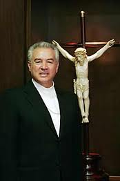 Cardenal Francisco Robles